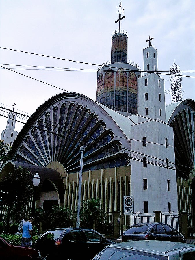 Vista parcial da Catedral de Sant'Ana